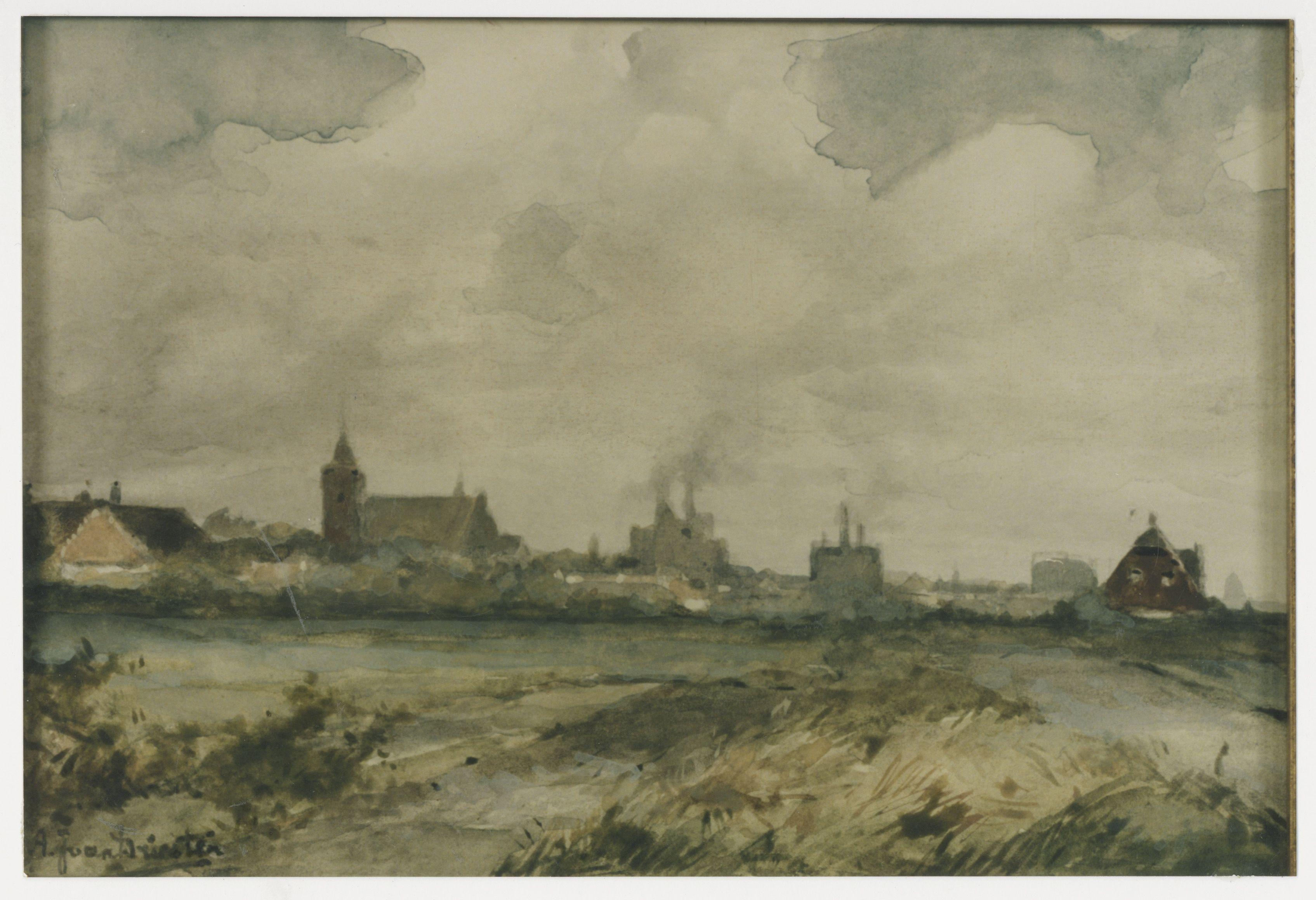 Gezicht op Leiden vanaf de Zijl / Arend Jan van Driesten. Profiel van Leiden vanuit het oosten, de Josephkerk aan de Herensingel (niet-realistisch weergegeven), de Lichtfabriek, de gashouders. Kleurenfoto van een aquarel. Afbeelding ca. 1930.